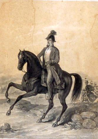 Welden táborszernagy lovon